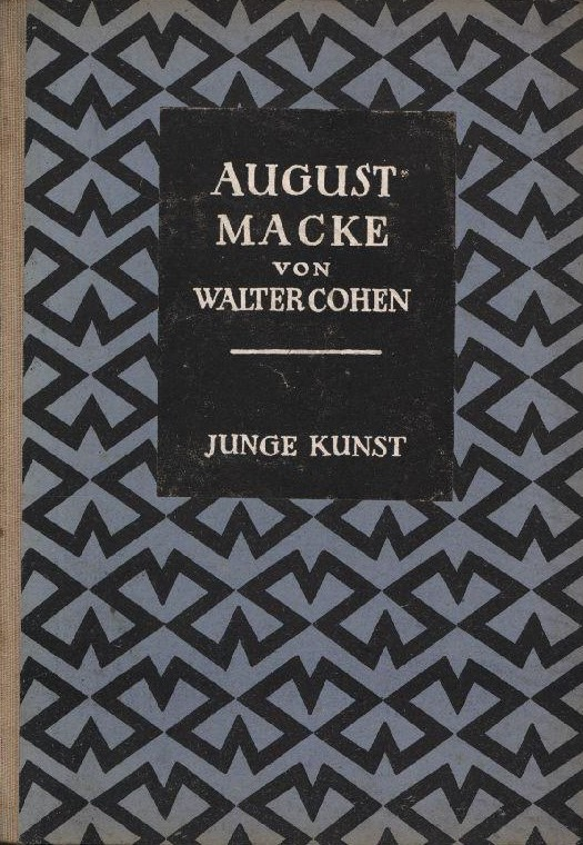 August Macke. Mit einer farbigen Tafel und 32 Abbildungen. Von Walter Cohen, Junge Kunst Band 32, Leipzig, Verlag von Klinkhardt & Biermann, 1922